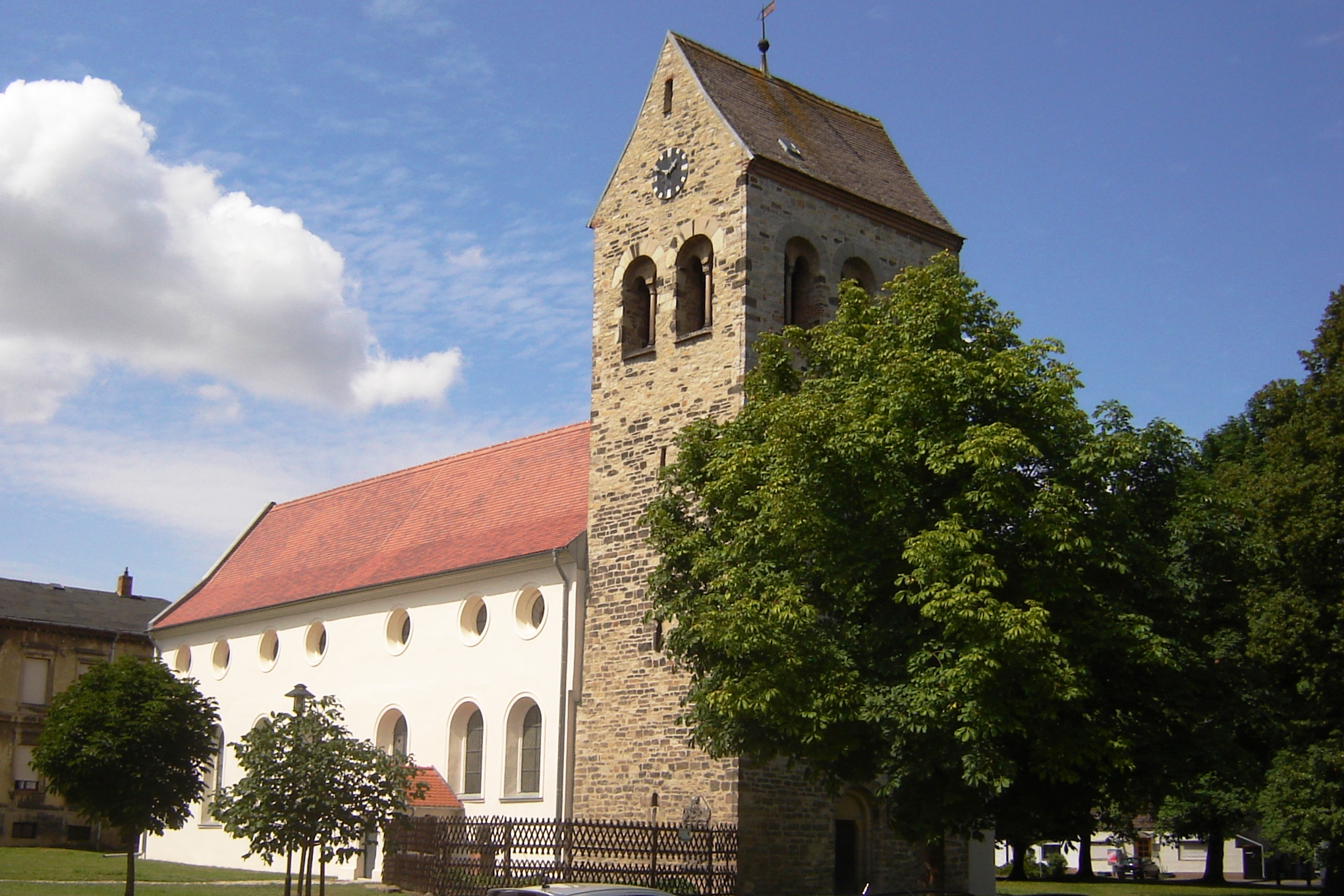 St.-Pankratius-Kirche in Welsleben, Sachsen-Anhalt, Deutschland (Südostansicht)